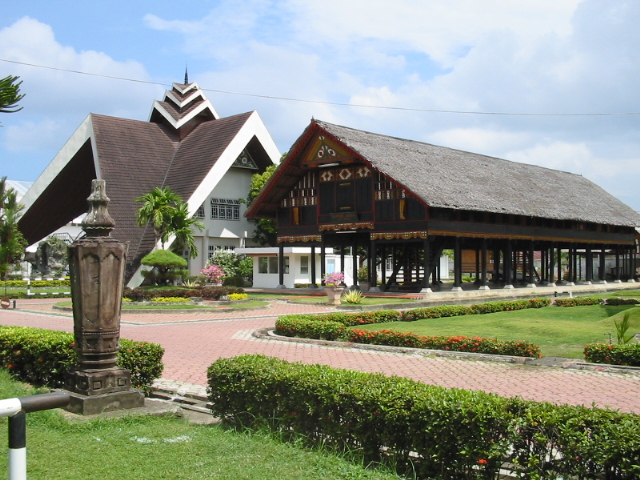 Museum Aceh di Banda Aceh